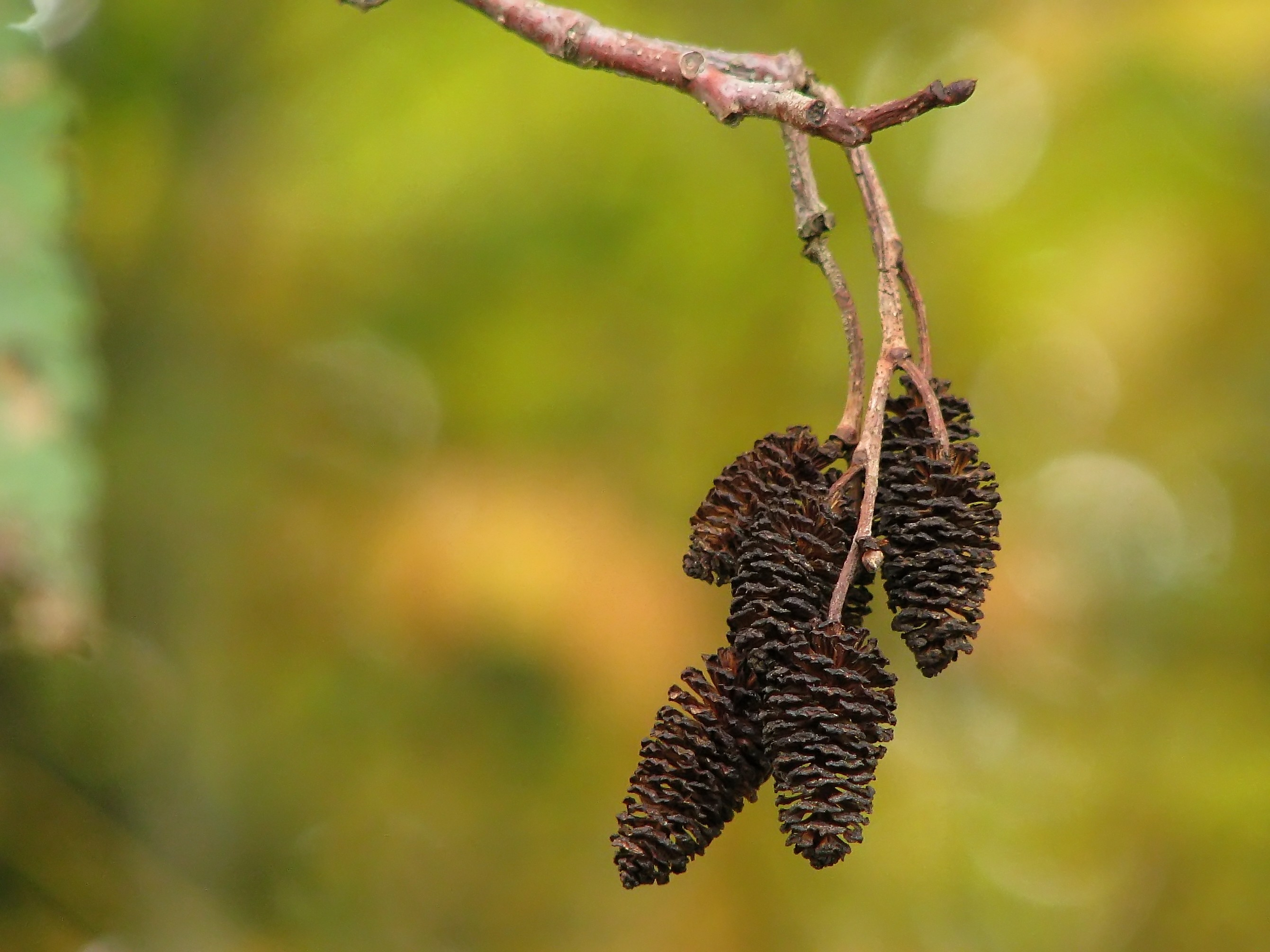 Red Alder Alnus rubra female catkins in autumn. West Linn, Oregon.